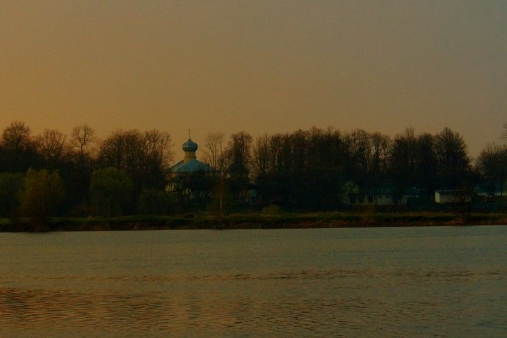 Шэбрын з боку р. Мухавец